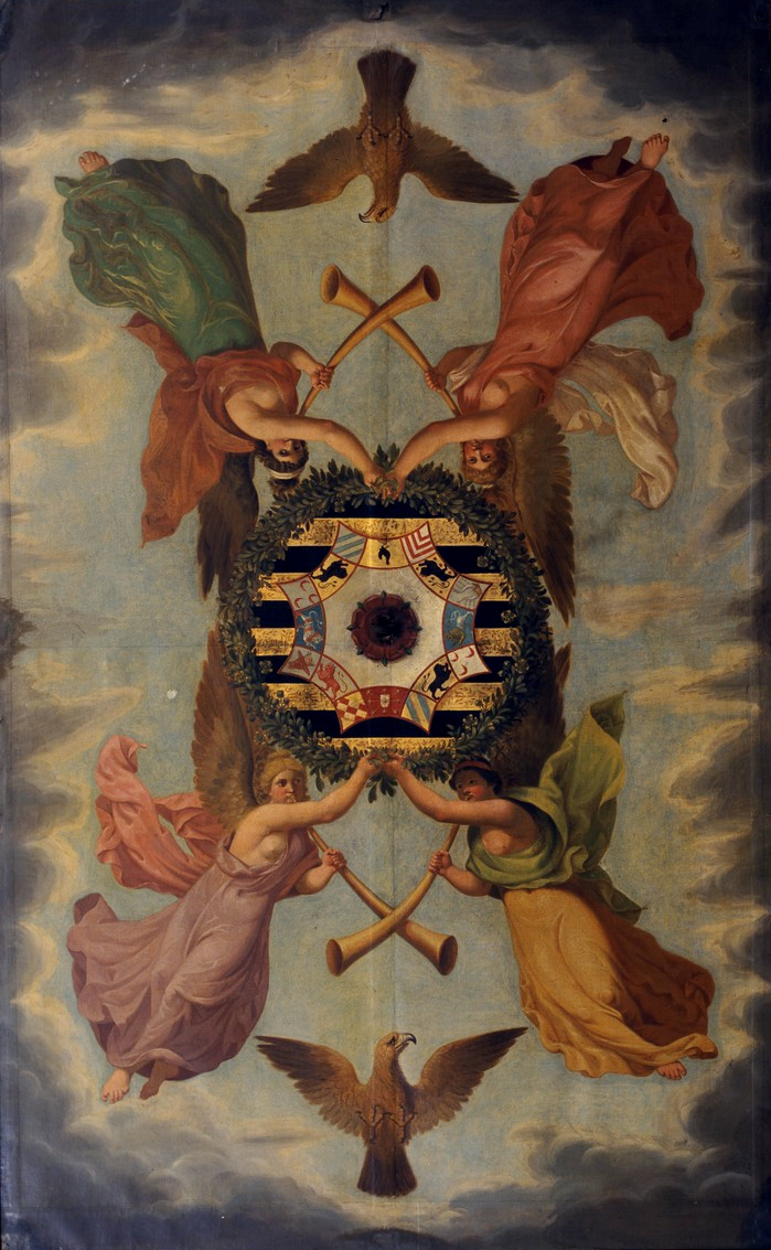 Vier Viktorien mit dem Weimarischen Wappen, um 1802, Weimar, Fürstliches Residenzschloss